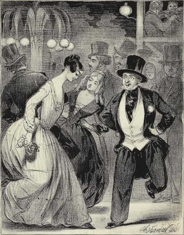 "Chez Mabille - Aspect de la Reine Pomaré dans l’un de ses plus gracieux exercices", dessin publié par le Charivari